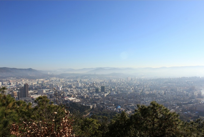 站在峨禄山顶俯瞰楚雄市貌